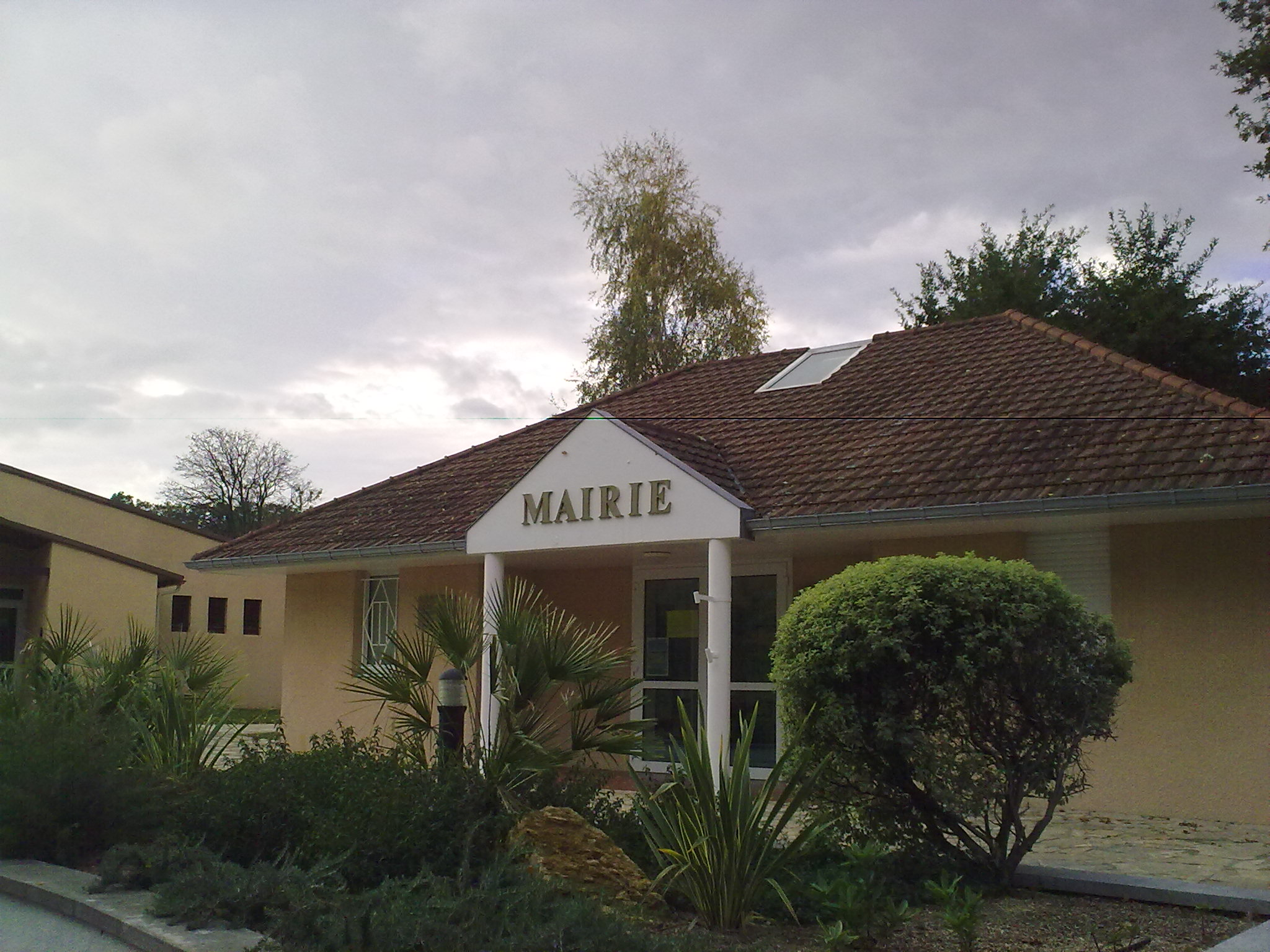 Viellenave-d'Arthez